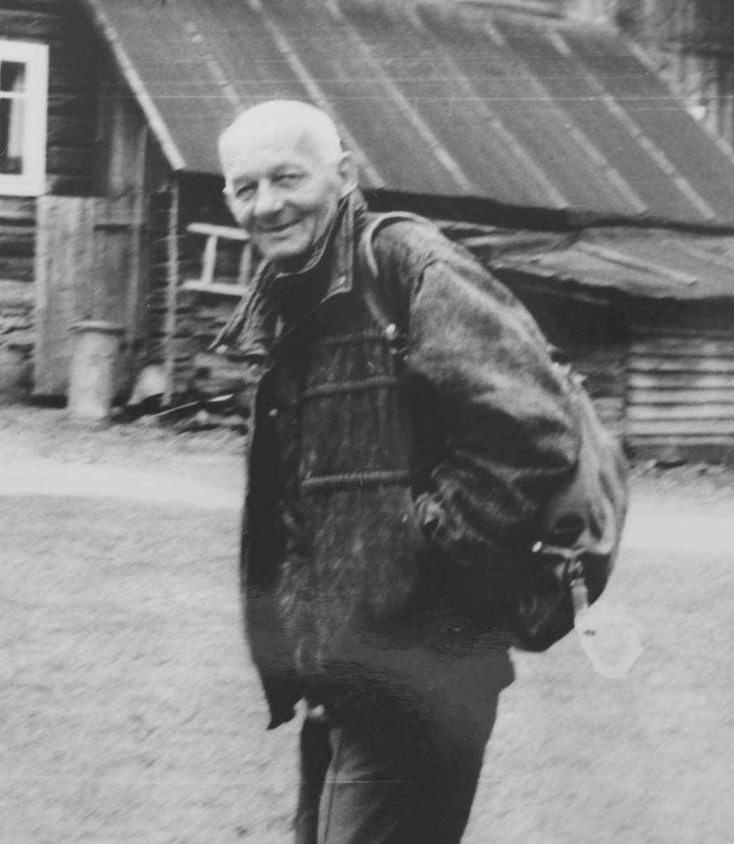 foto Jan a Mlodozenca, Zakopane 1989